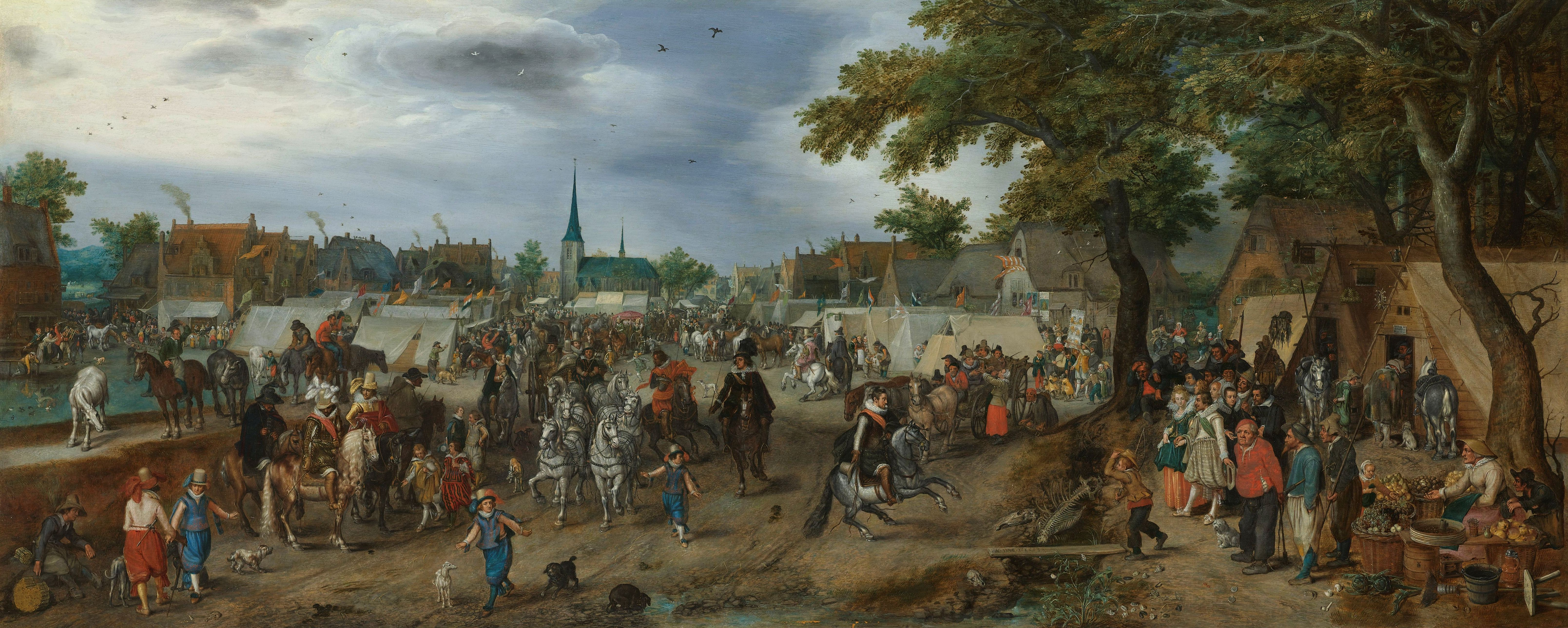 De prinsen van Oranje Maurits en Frederik Hendrik op de paardenmarkt te Valkenburg. De prinsen zitten in een open koets getrokken door zes paarden. Links en rechts tenten van de marktlui, rechts vooraan een groente- en fruitverkoopster.; Adriaen Pietersz van de Venne (ca. 1589–1662), olieverf op paneel, 1618